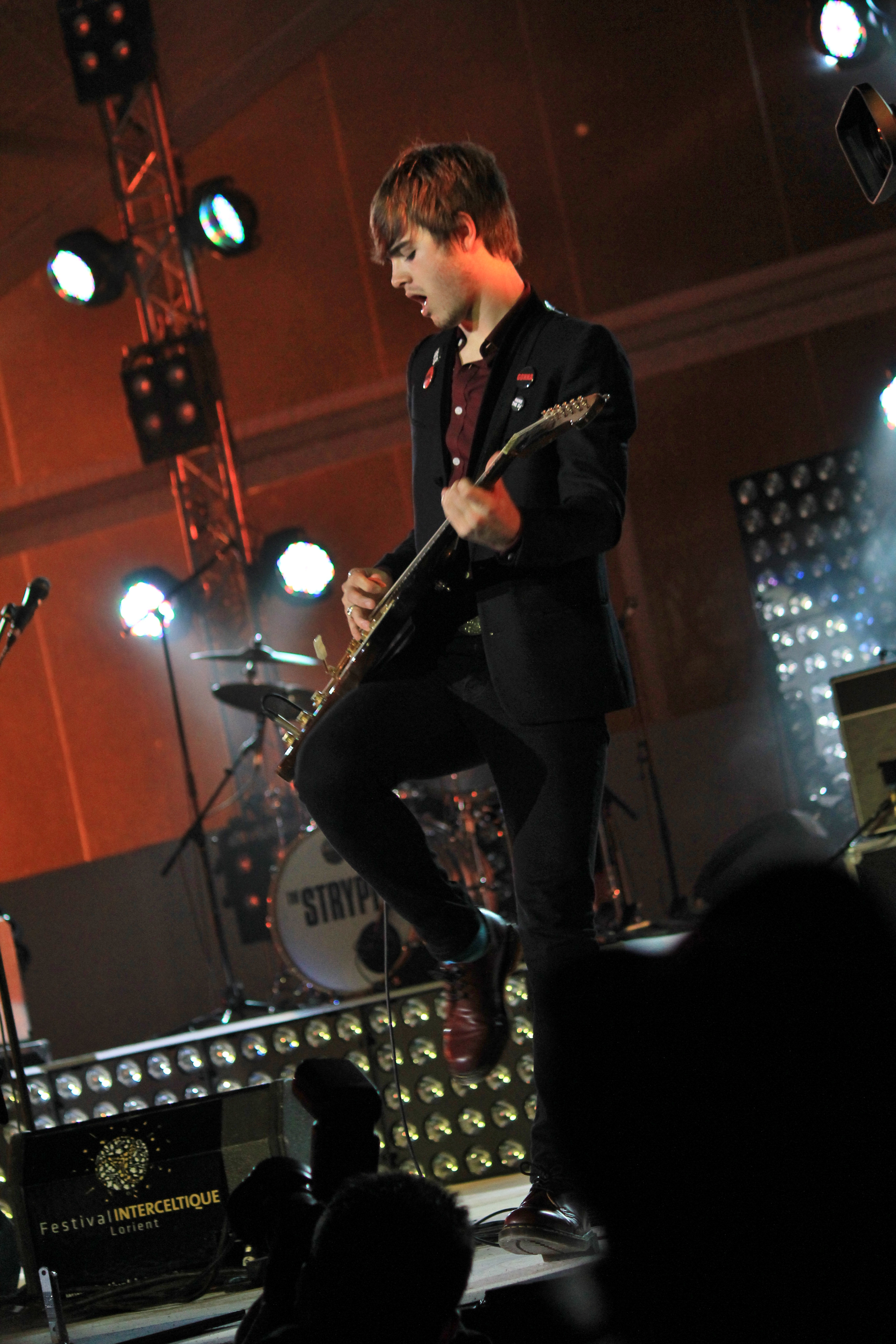 Concert de The Strypes lors du festival interceltique de Lorient 2014.